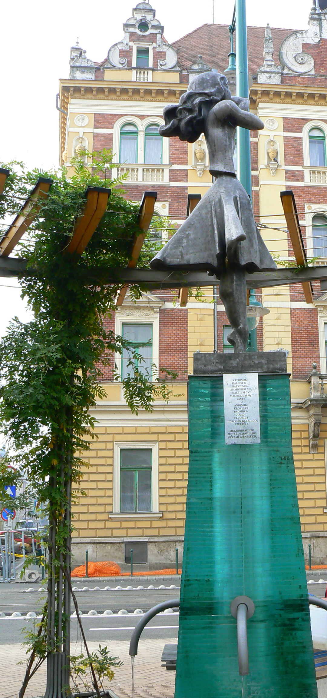 Szegeden található gyógyvíz létezését olajfúrások közben fedezték fel. A kutat 1927-ben fúrták Vajna Ferenc geológus szakvéleménye alapján, melynek mélysége 944 méter. Az 52 fokos lúgos-jódos víz leginkább gyomorbántalmak enyhítésére és reumatikus illetve izületi betegségekre alkalmas. Gyakran hosszú sorok kígyóznak a kútnál, hiszen sokan kannákkal és palackokkal felszerelkezve várják sorukat, hogy hazavihessenek pár litert a gyógyító vízből. Az Anna elnevezés onnan ered, hogy Patzauer Dezső lányáról Anna-víznek nevezte el a szénsavval telített, elsőként 1938-ban forgalomba hozott gyógyhatású vizet.